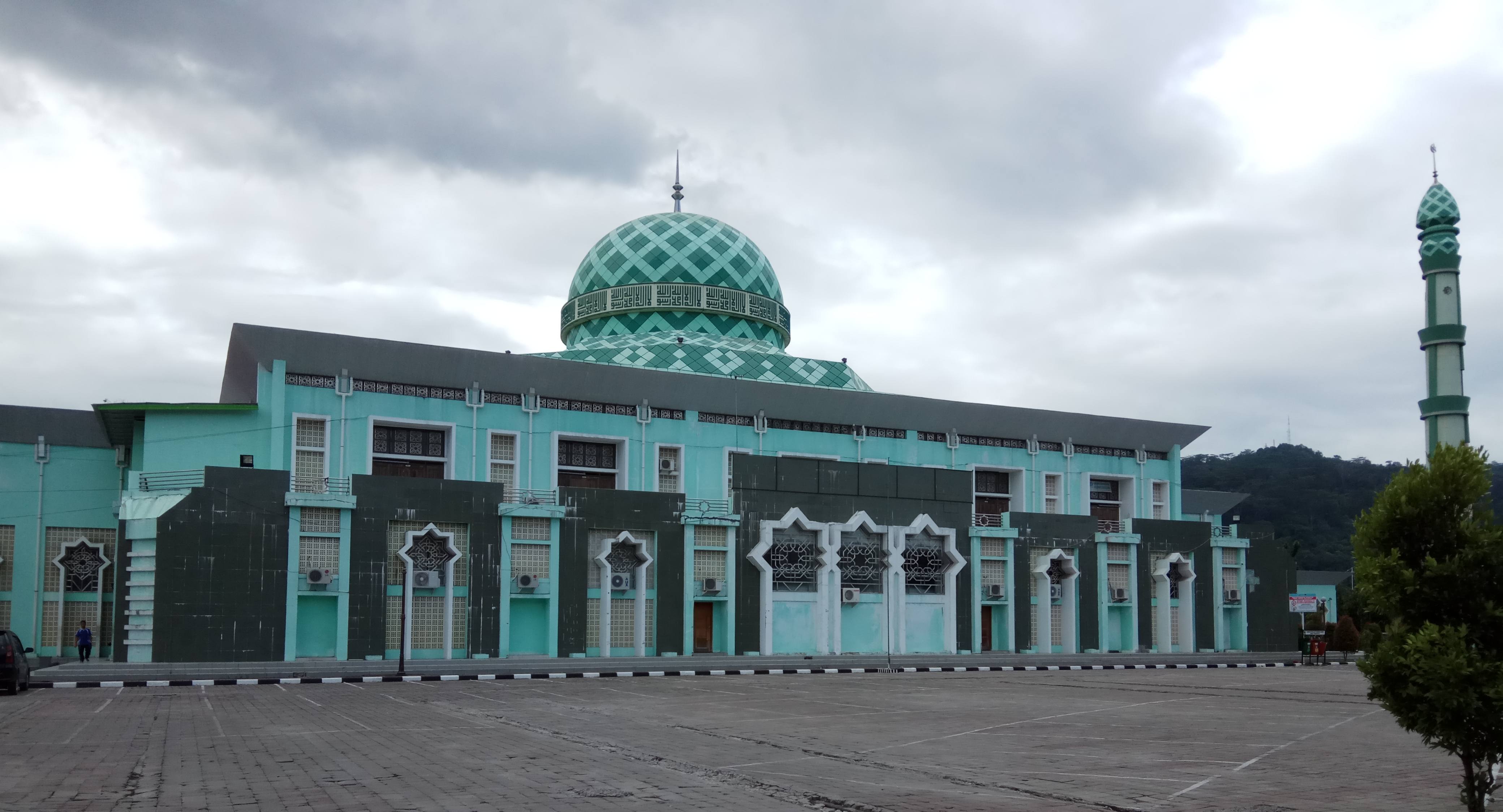 masjid nurul iman di padanh